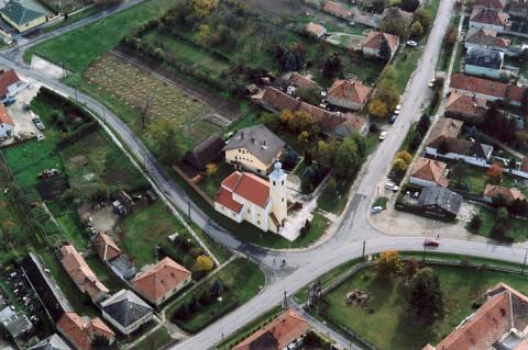 Máriakálnok, Hungary, aerialphotography